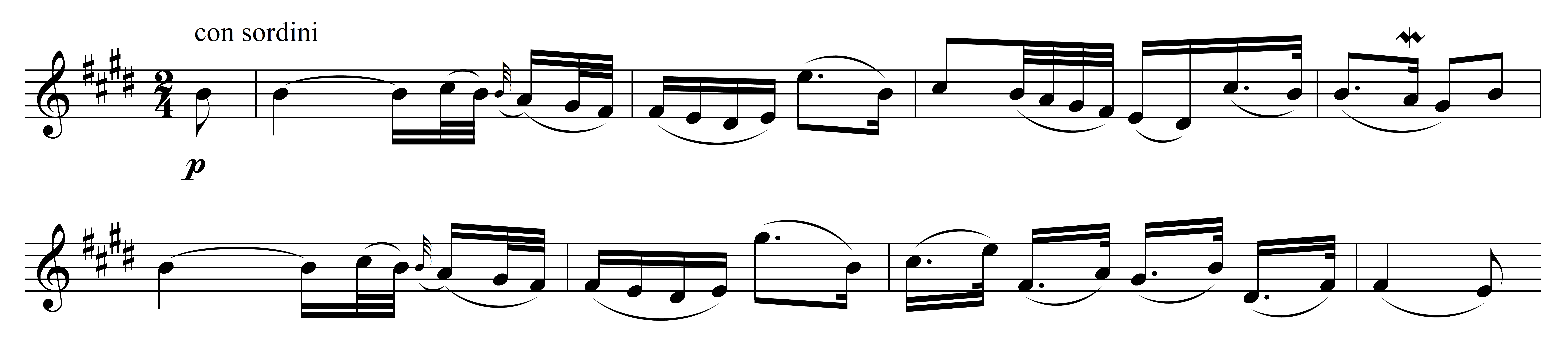 Notenbeispiel Haydn Sinfonie 44 - 3. Satz Hauptthema T. 1-8